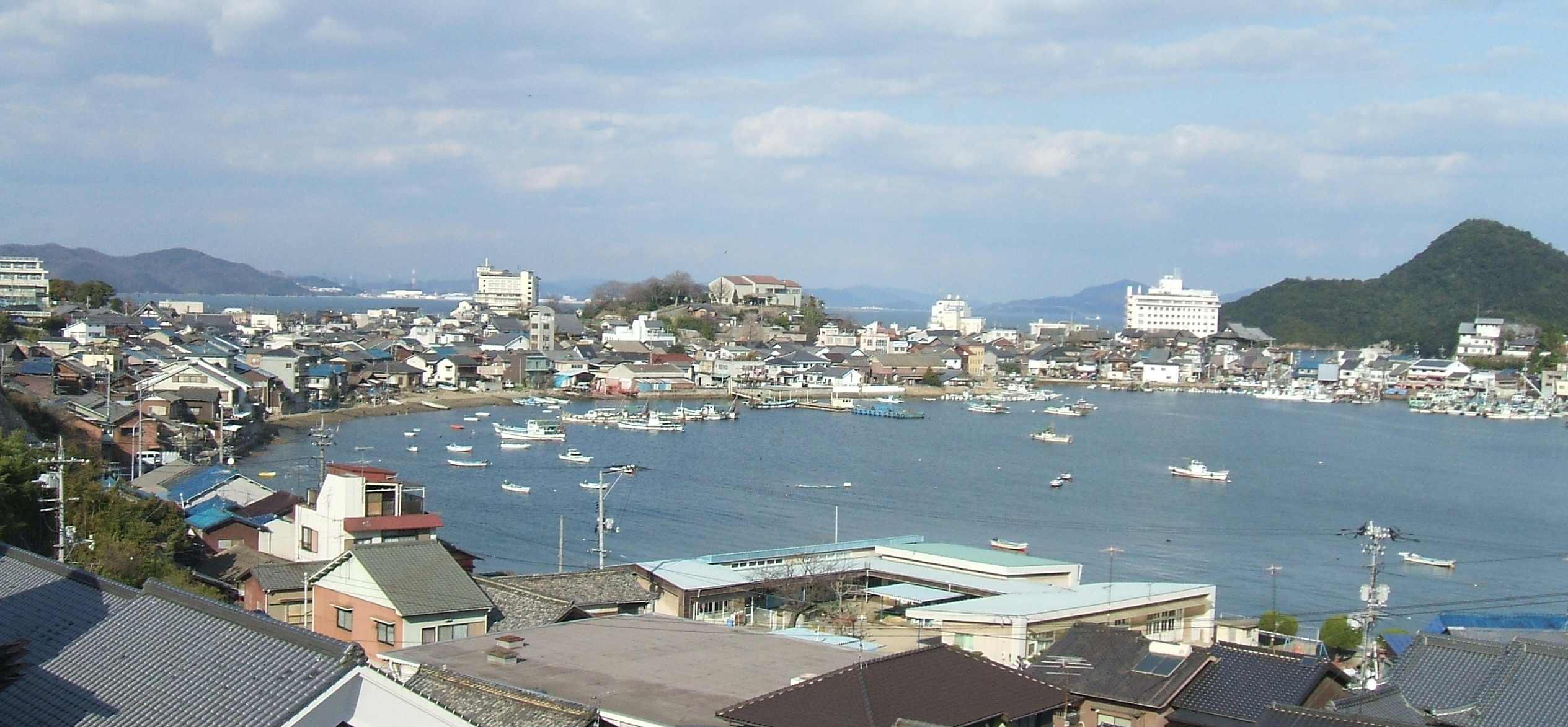 鞆港を南西から撮影した画像